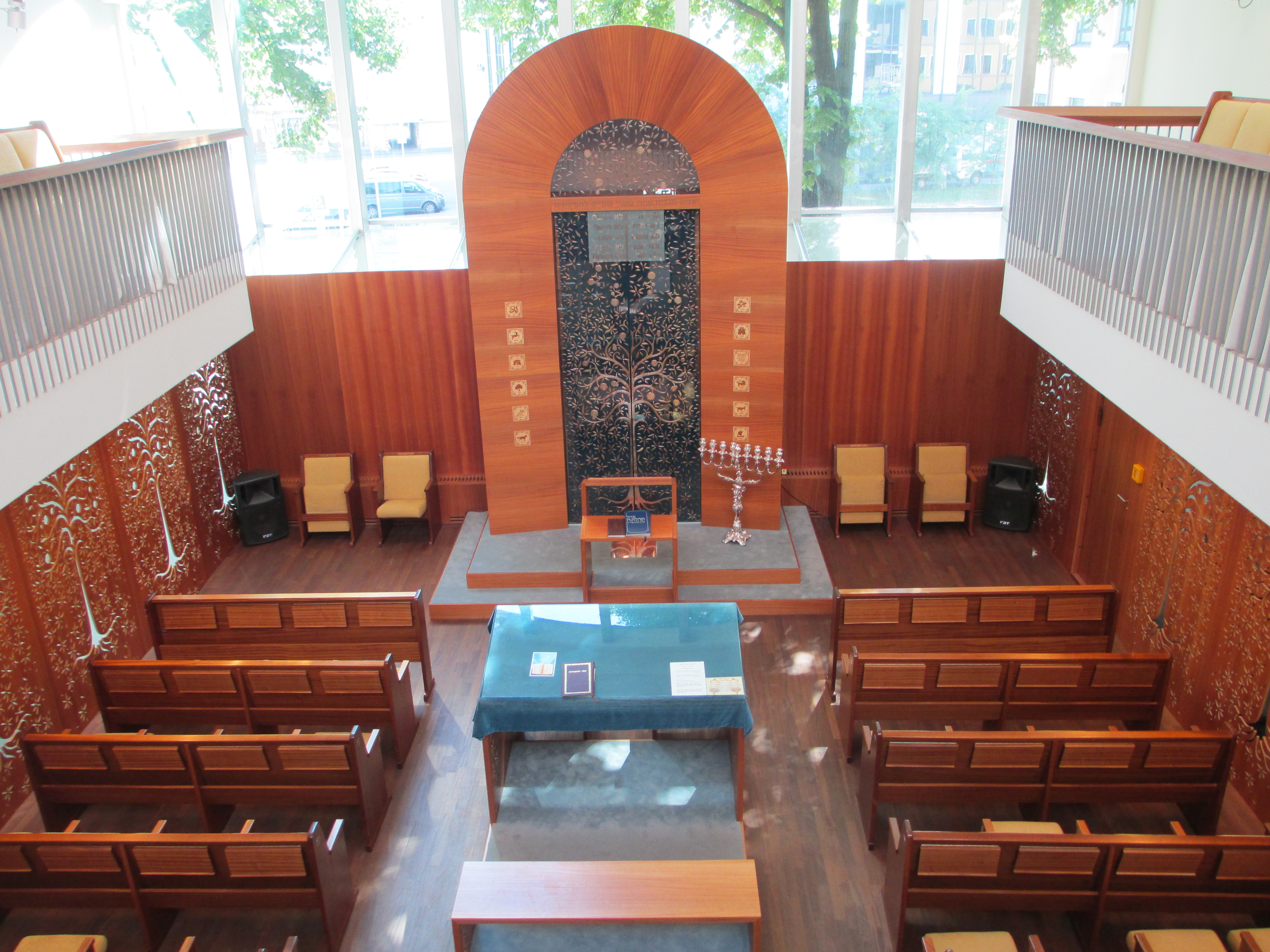 בית הכנסת בטאלין